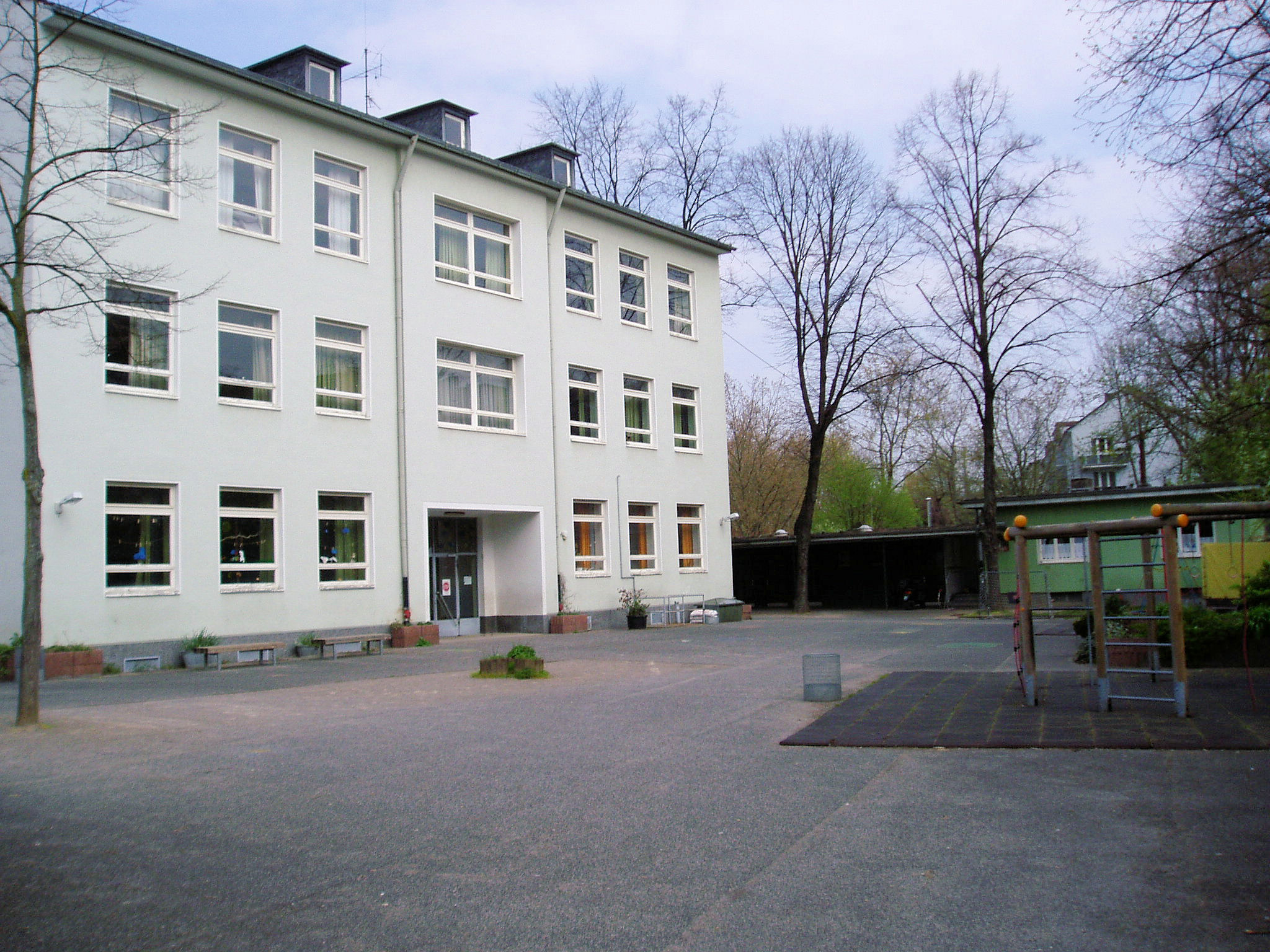 Grundschule Schulstr. in Köln-Höhenberg. Duie Schule kann aufgrund von Mauerfäulnis nicht mehr genutzt werden Trivial:Dies ist die ehemalige Grundschule des Fotografen...